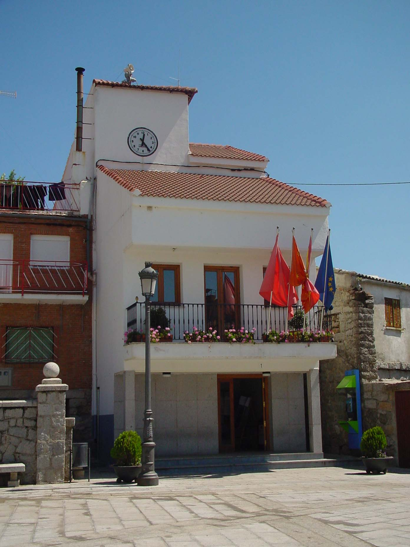 Ayuntamiento de Fresnedillas de la Oliva.